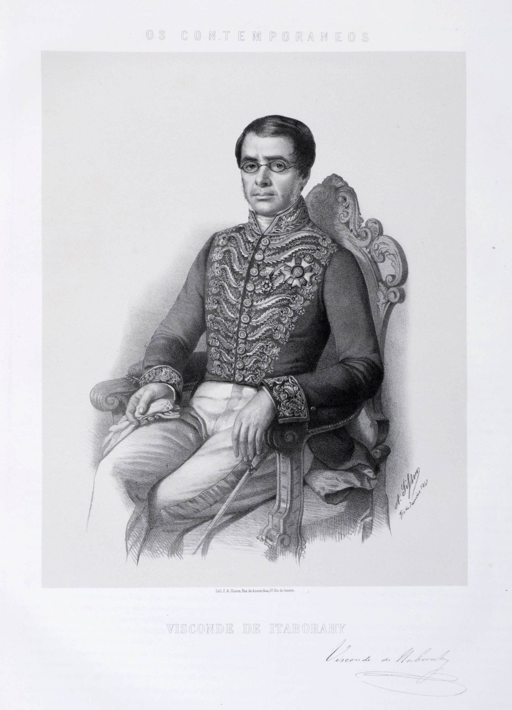 Litografia em preto e branco